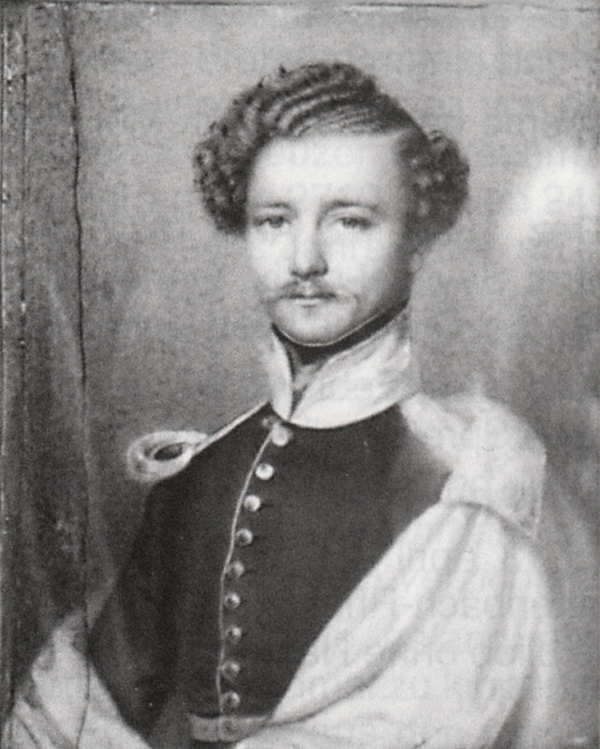 Siegmund Carl August Graf von Yrsch-Pienzenau (1808-1899)